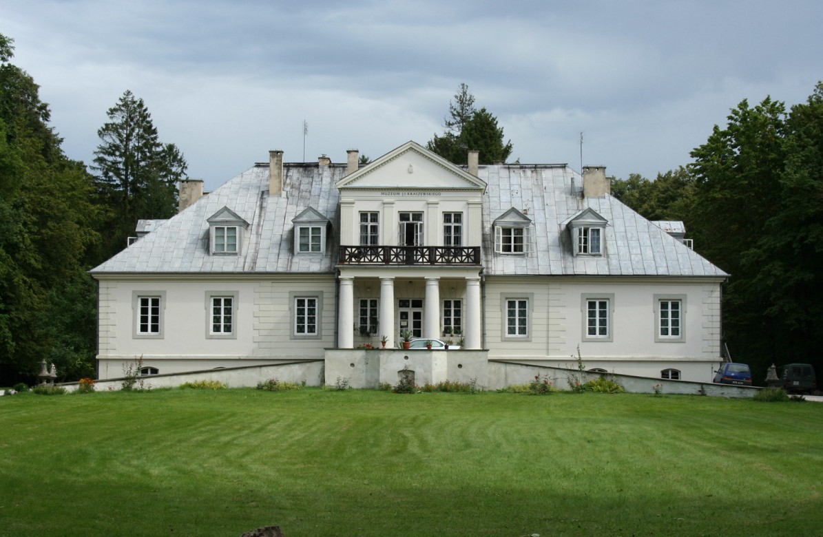 Romanów - zespół pałacowy, obecnie muzeum: - pałac (1806, 1962) - grobowiec rodziny Kraszewskich (XIX) - park otoczony fosami (XVI-XIX) zabytek A-49 z 11.11.1966